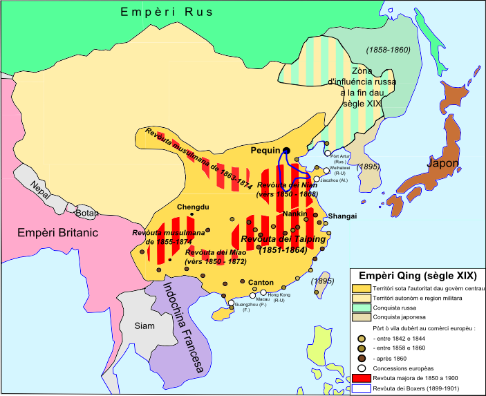 Empèri Qing e imperialismes europèus e japonés au sègle XIX.